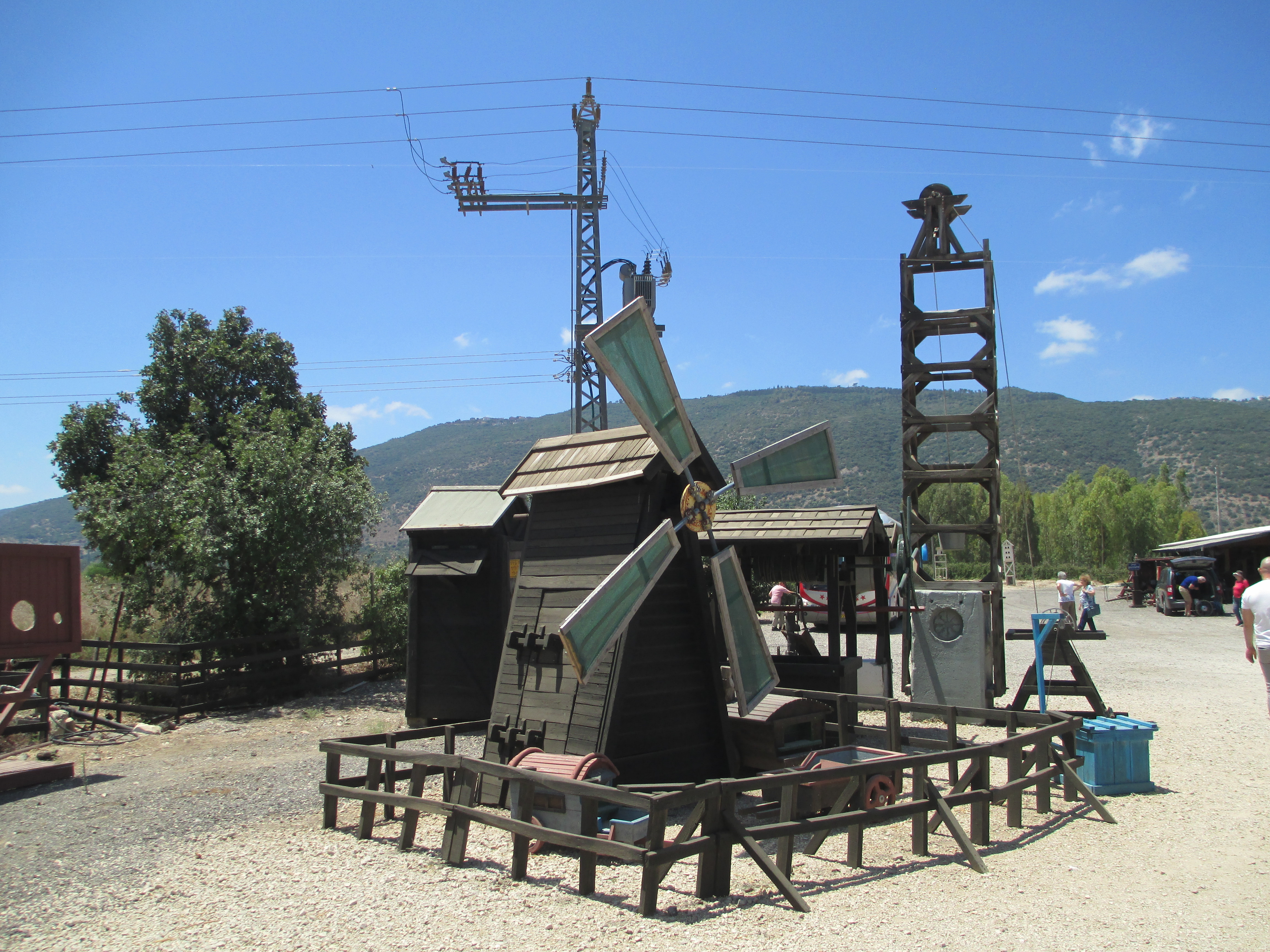 מוזיאון יענקל'ס שטעטל בכפר חסידים